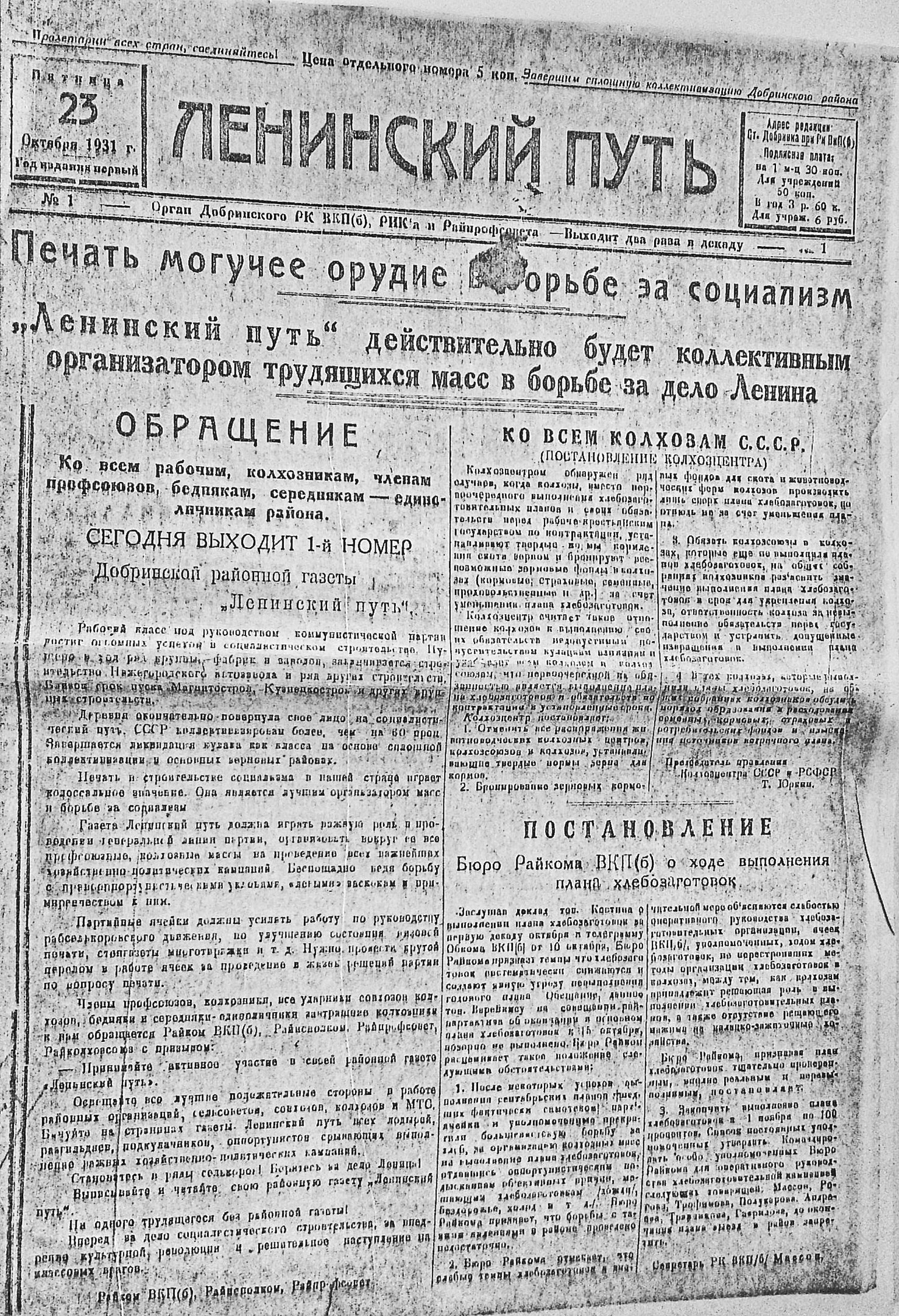 Первая полоса первого номера районной газеты. Газета "Ленинский путь" от 23.10.1931